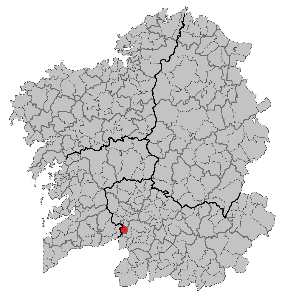 Mapa coa localización do concello de Cortegada.